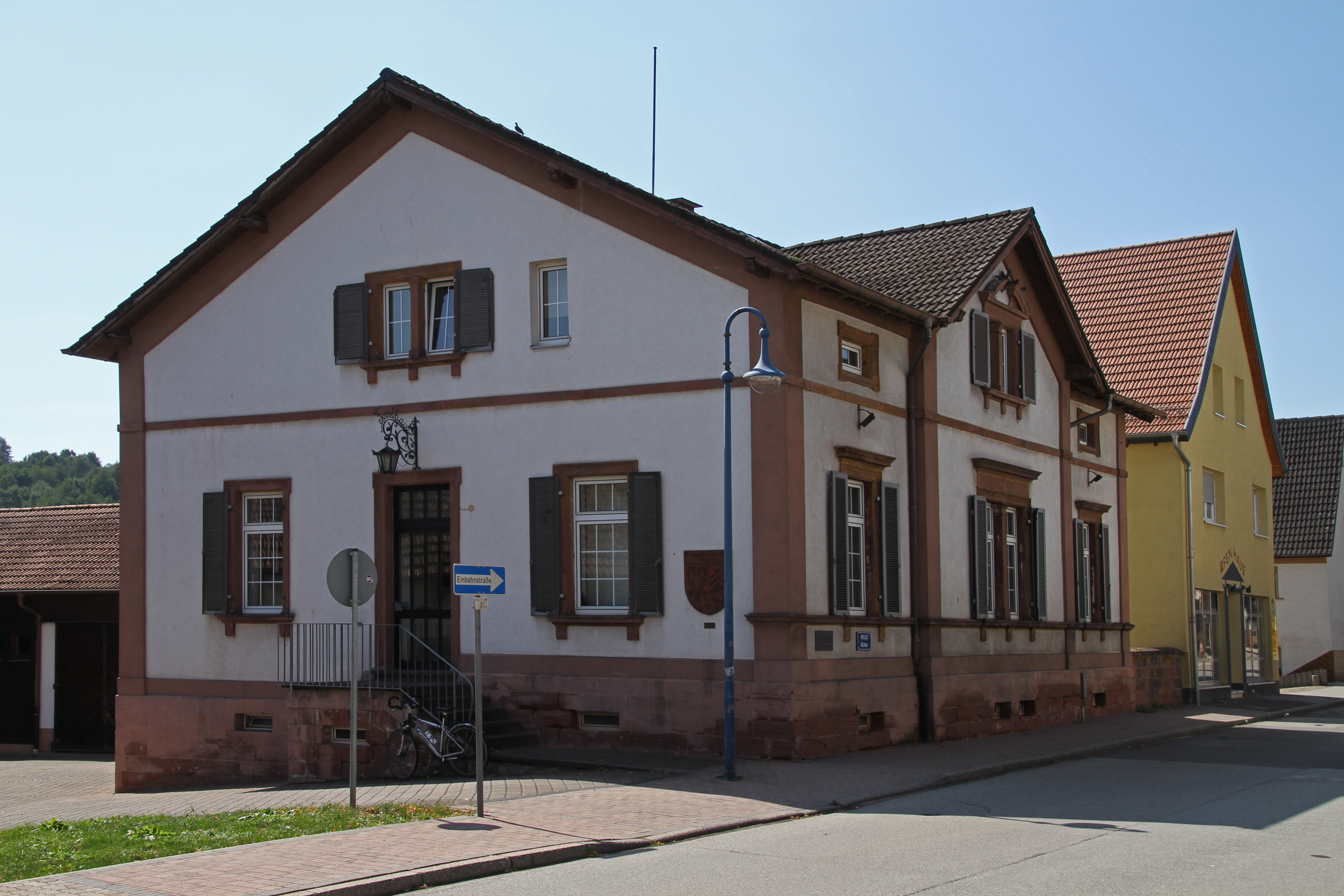 Thaleischweiler, Hauptstraße 1, Dorfgemeinschaftshaus; ehemaliges Forsthaus; eineinhalbgeschossiger spätklassizistischer Putzbau, 1883.